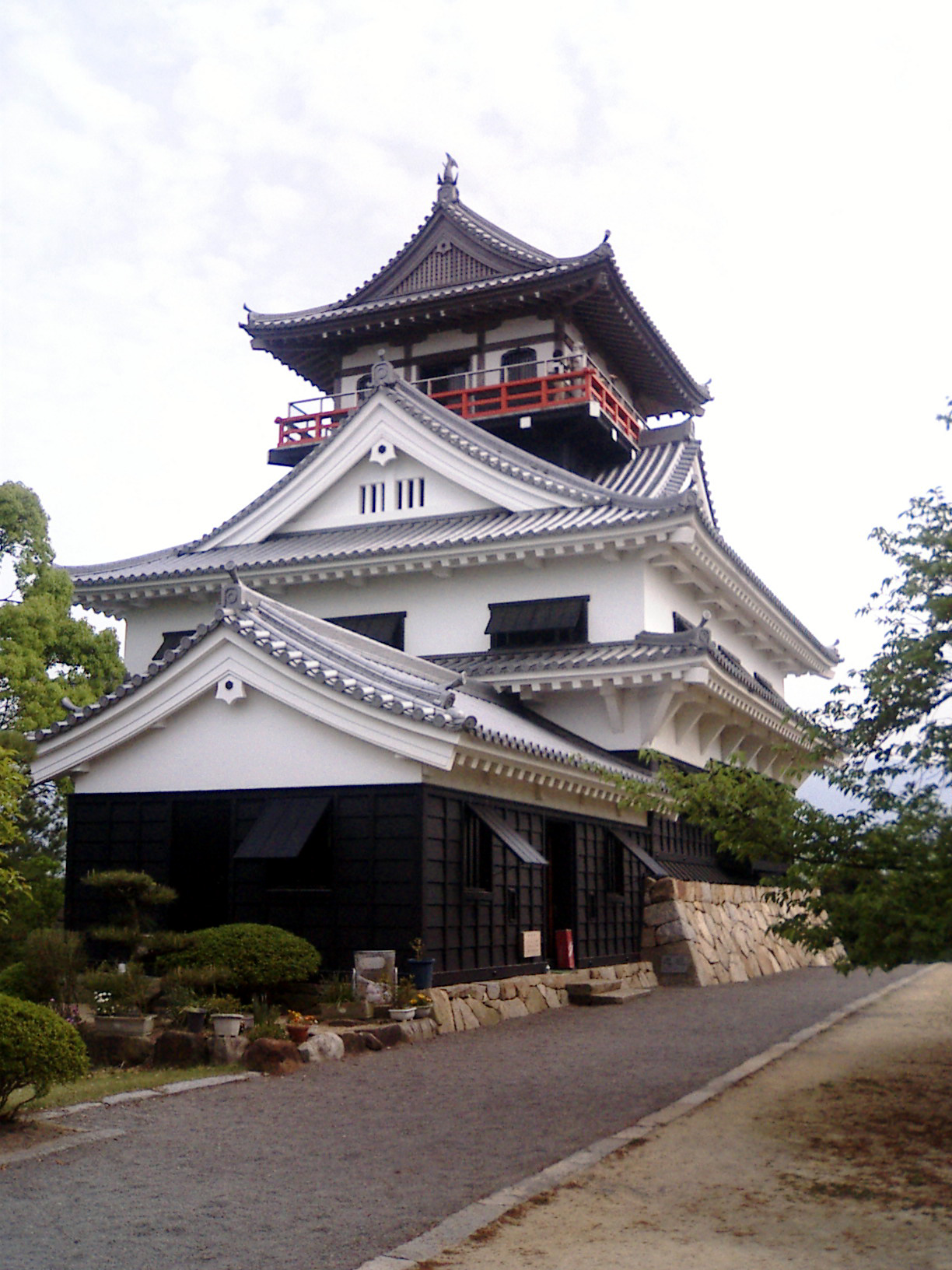 川之江城（復元施設）：（日本国愛媛県四国中央市）